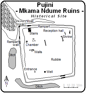 Map of Mkama Ndume ruins at Pujini village, Pemba